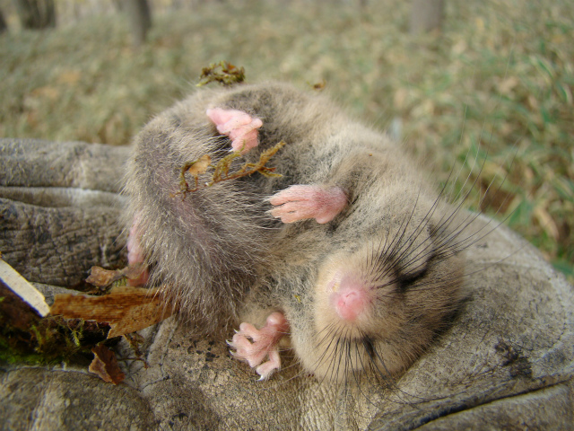 冬眠直前のヤマネの状態 （手に乗せても動きが鈍い）